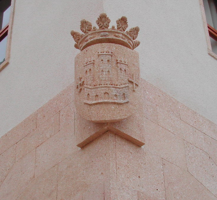 Representación del Escudo municipal de Montesa (Valencia) situada en la fachada del Ayuntamiento.